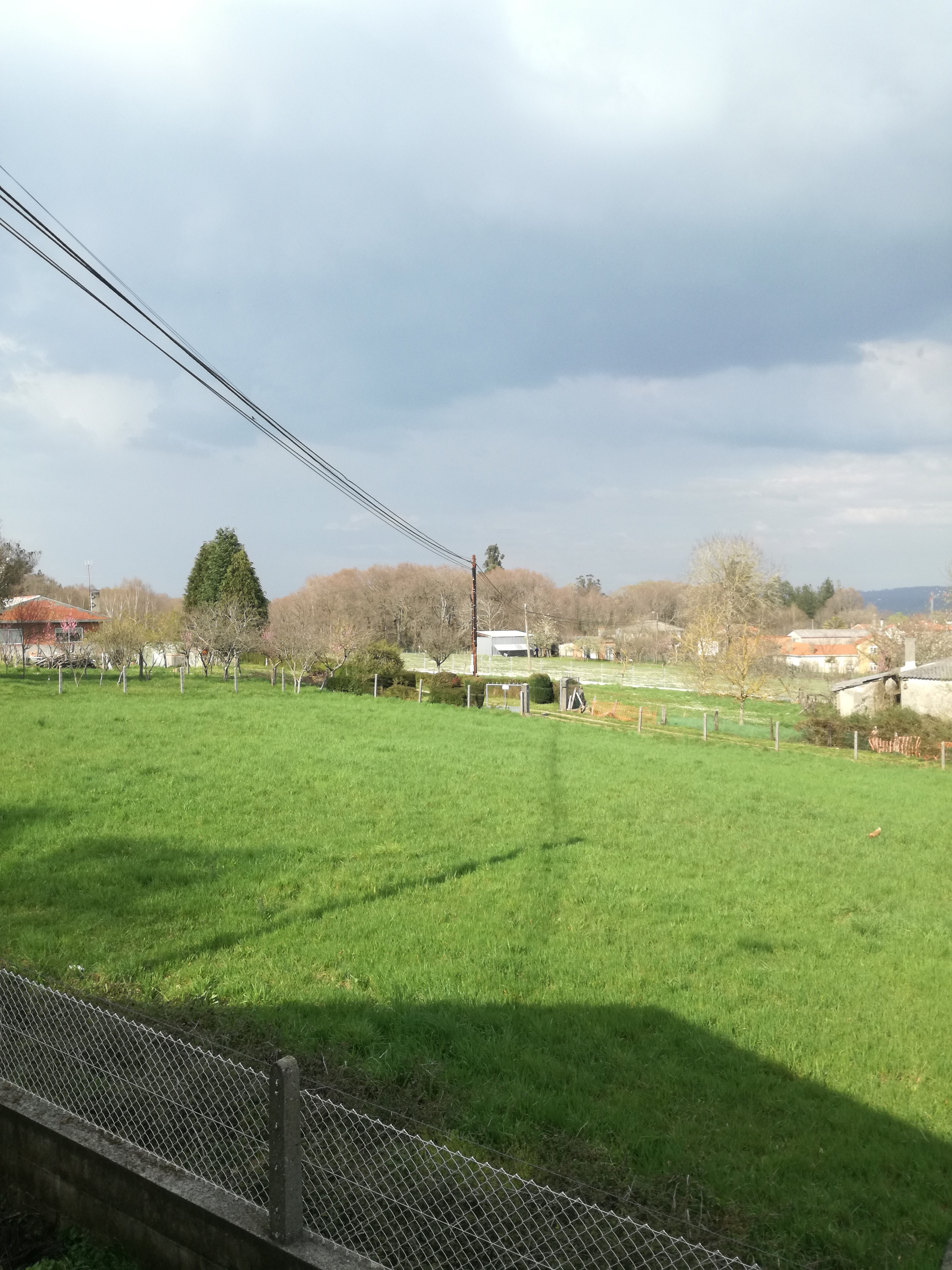 Vista de Vilar